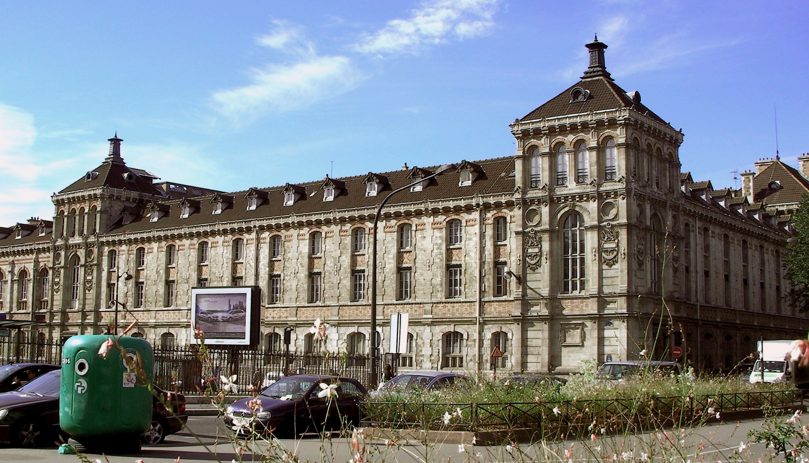 Lycée Chaptal (Inscrit) .